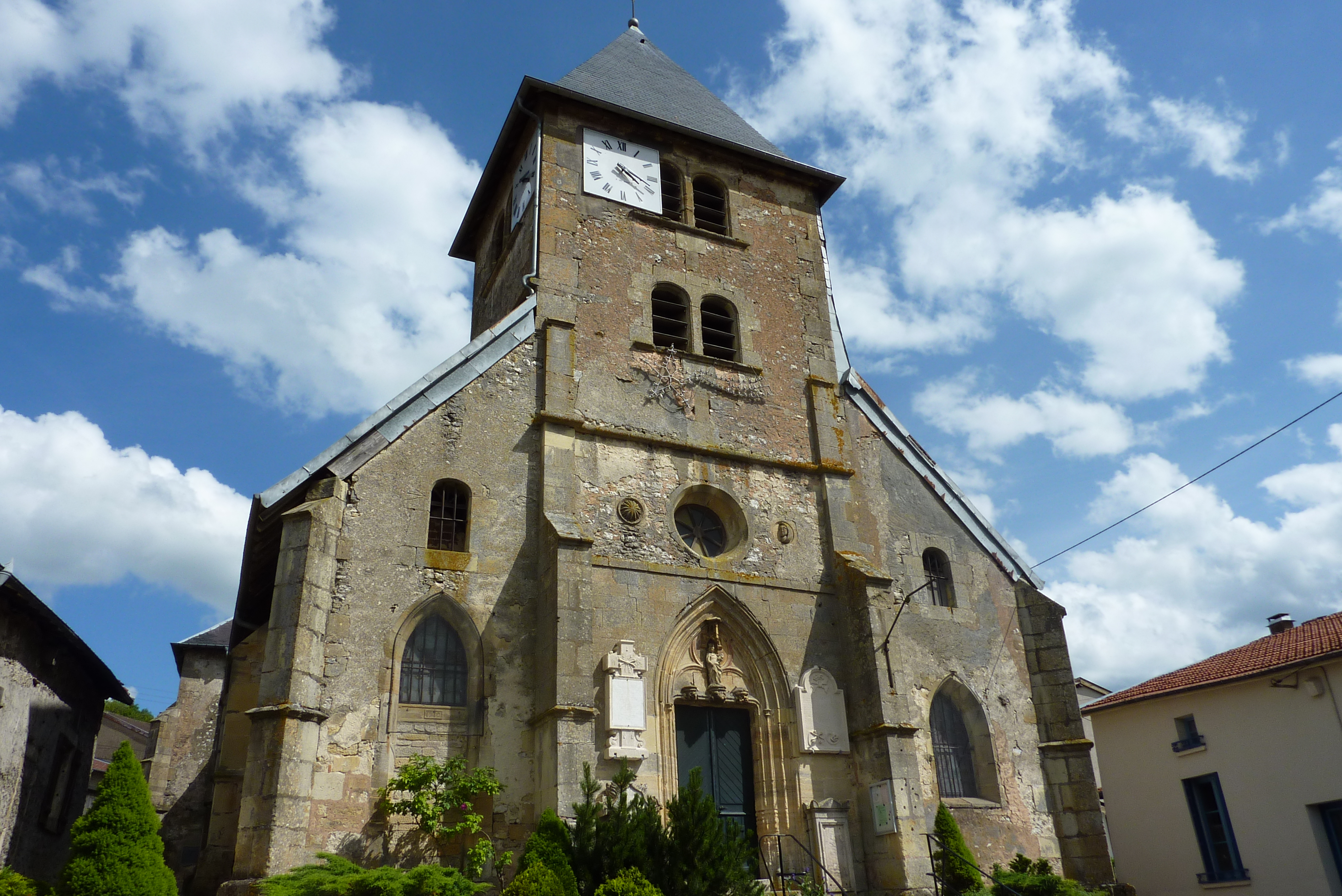 Eglise Saint-Maurice de Naives-devant-Bar (Commune de Naives-Rosières), XVIe siècle, classée Monument Historique